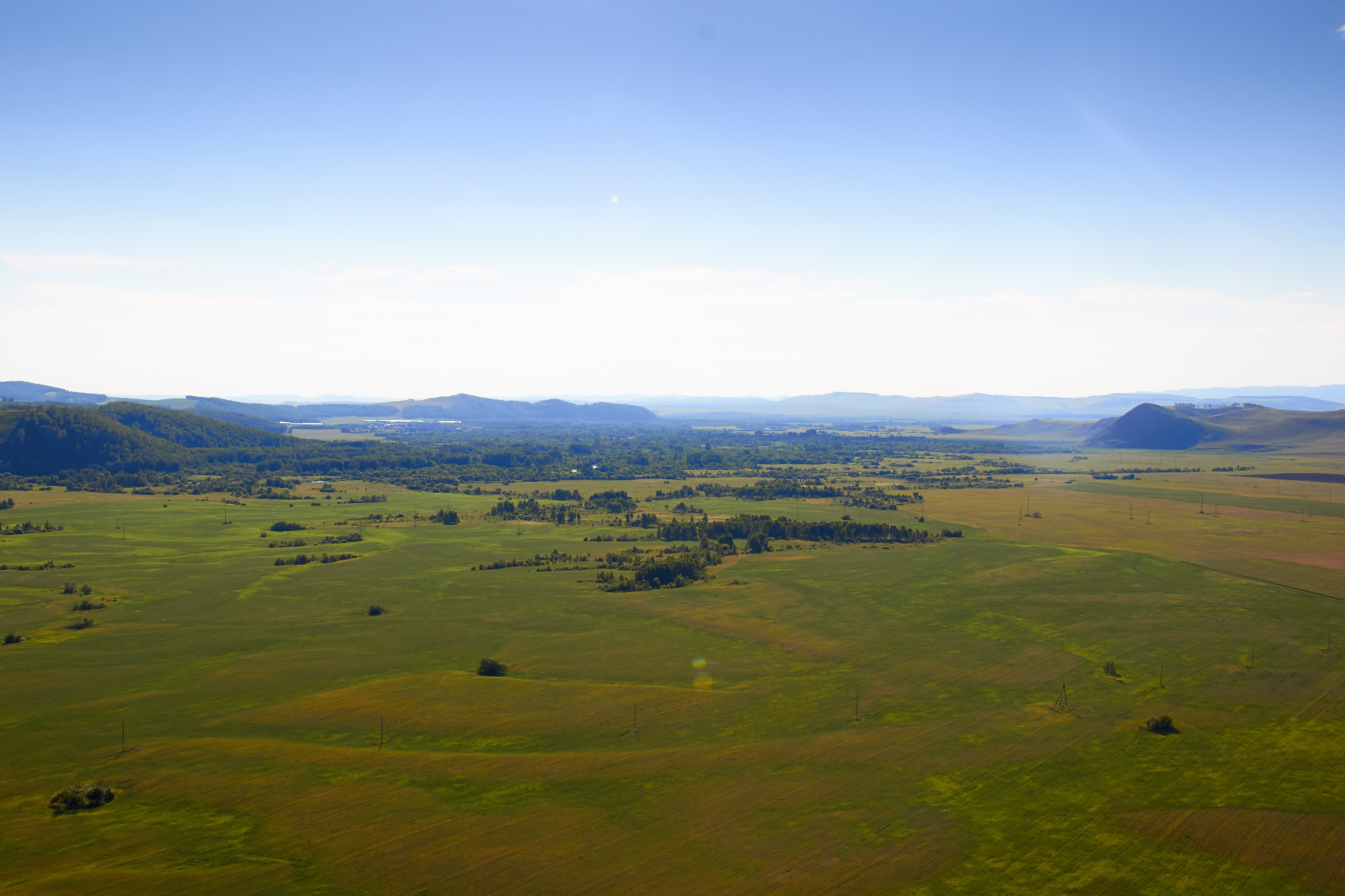 Вид со второго Тигея